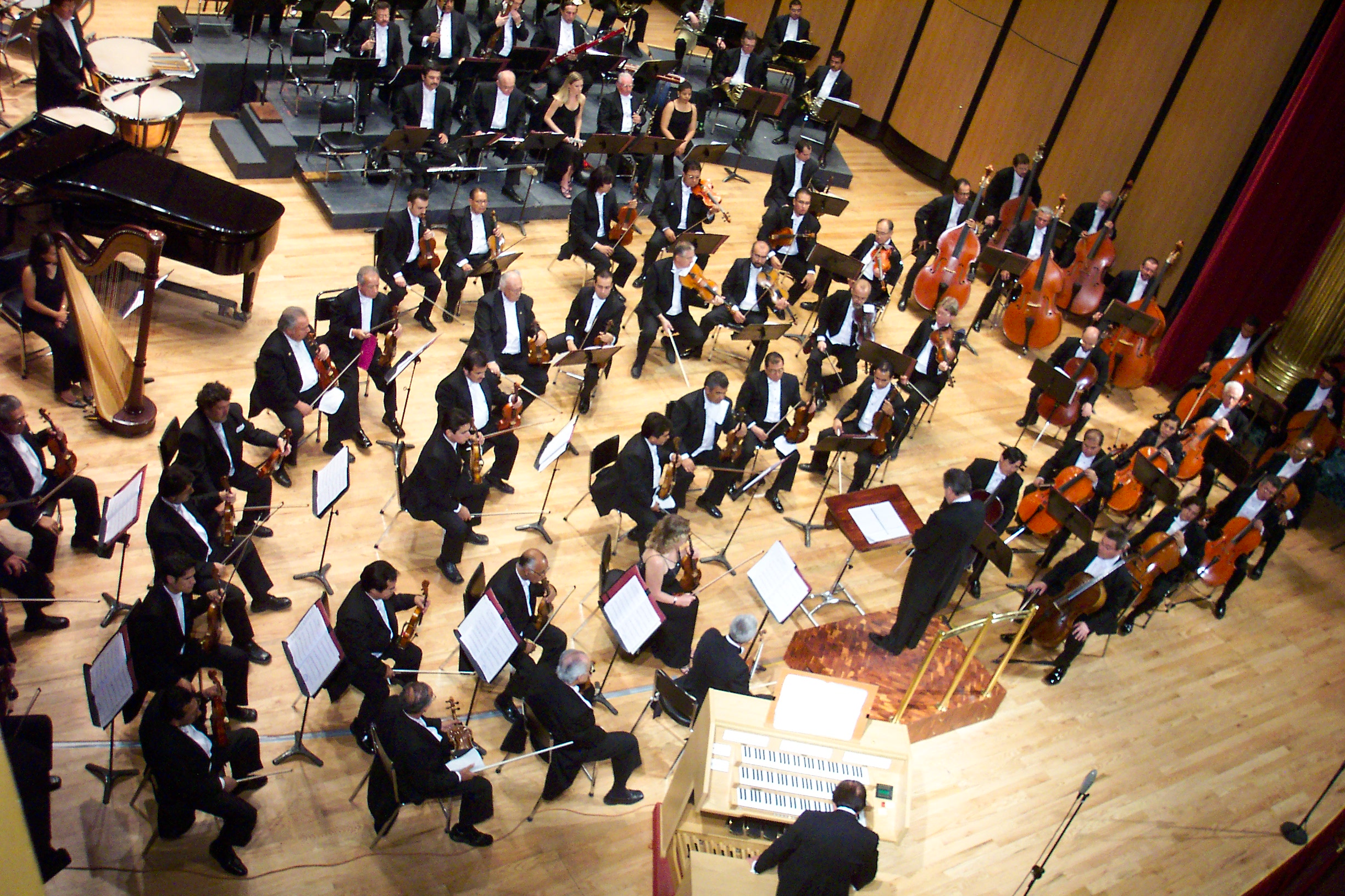 Philharmonic Orchestra of Jalisco (Guadalajara, Jalisco, Mexico)